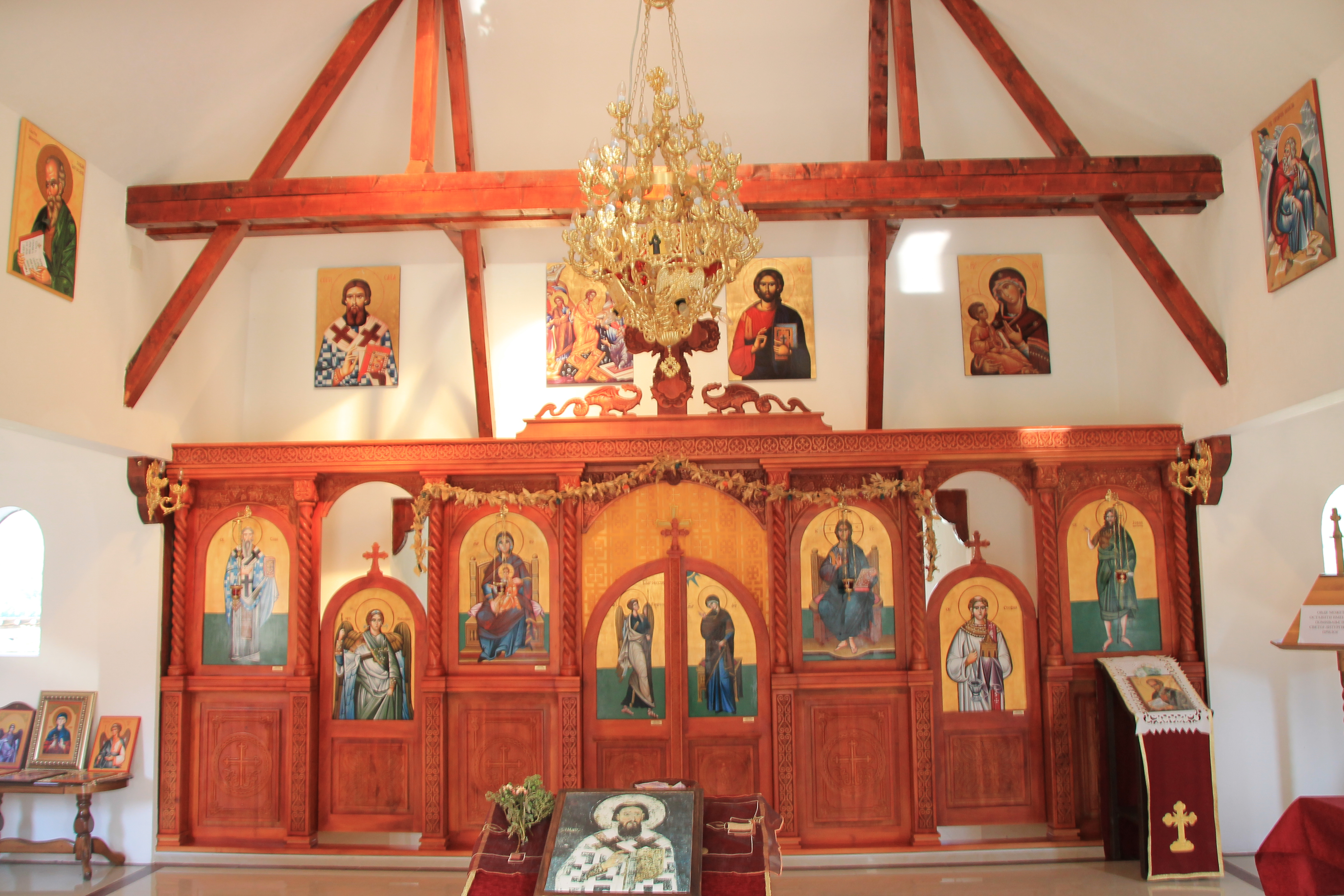 Crkva Sv. Save (Kolare)